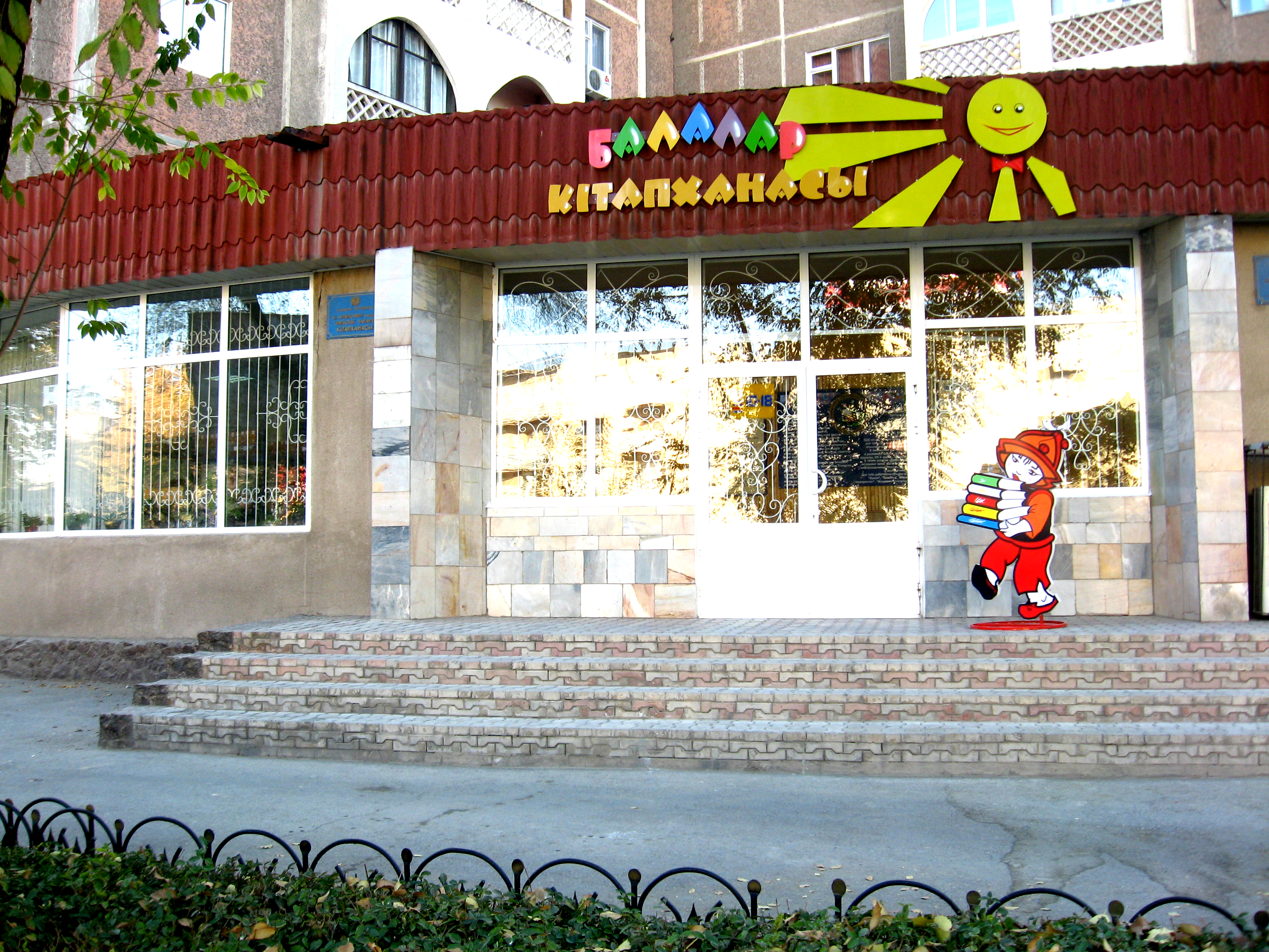 Ы. Алтынсарин атындағы Оңтүстік Қазақстан облыстық балалар кітапханасы